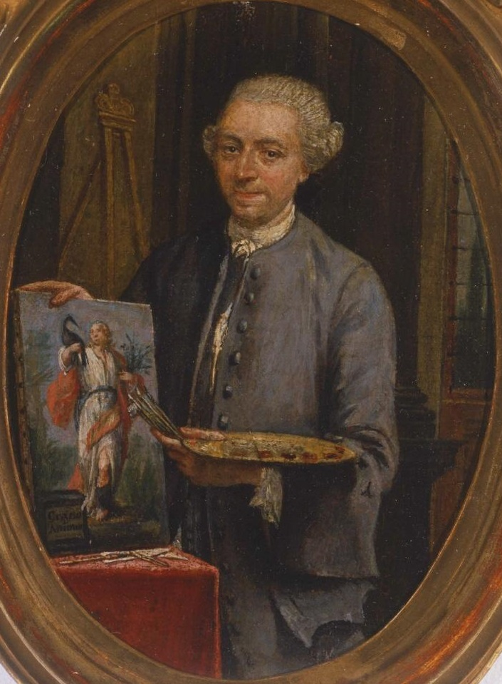 Autorretrato del pintor español Joaquín Inza (1736-1811).